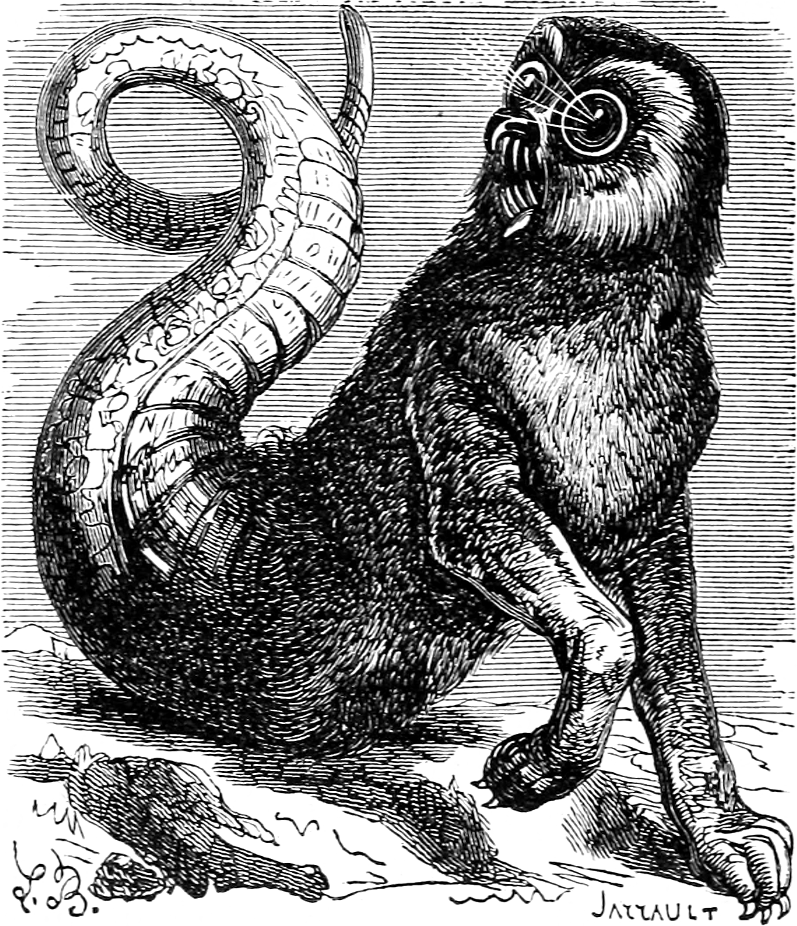 Une illustration pour l’article Amon dans le Dictionnaire infernal par Collin de Plancy.